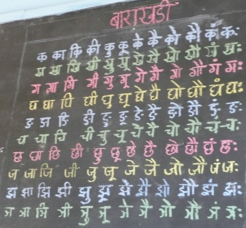 Marathi alphabet, Khairat (India)